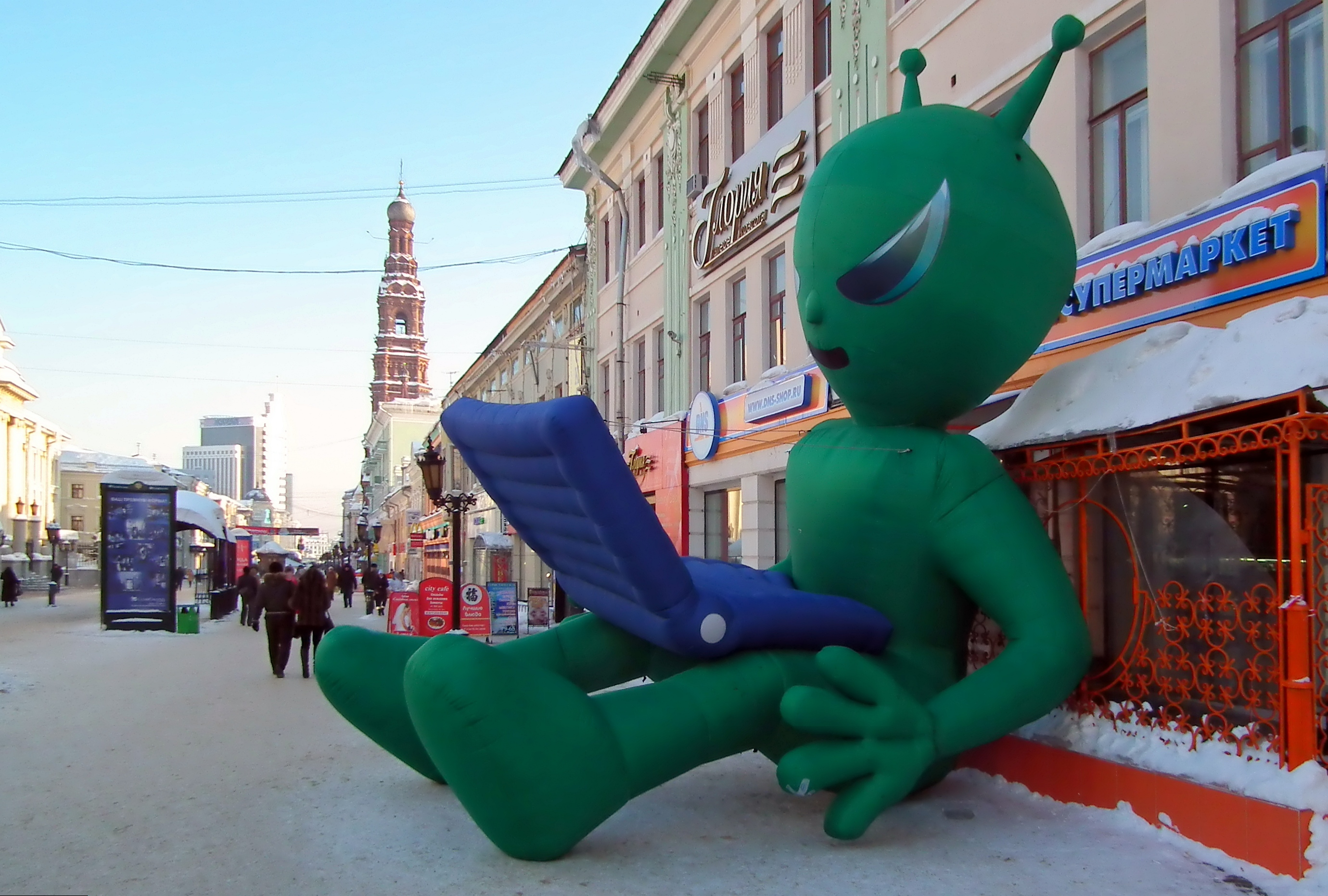 зелёные человечки добрались и до Казани